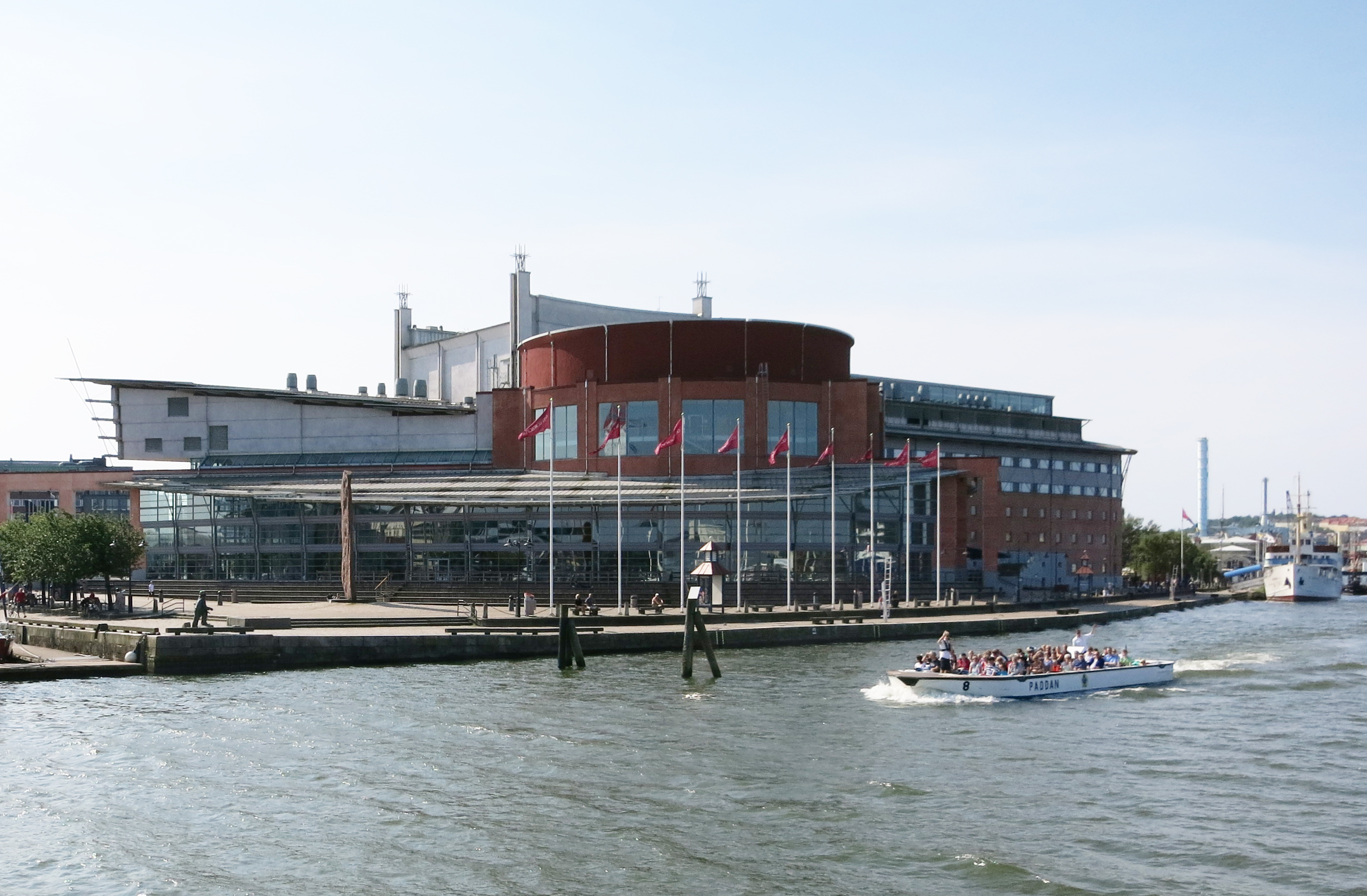 GöteborgsOperan from the river